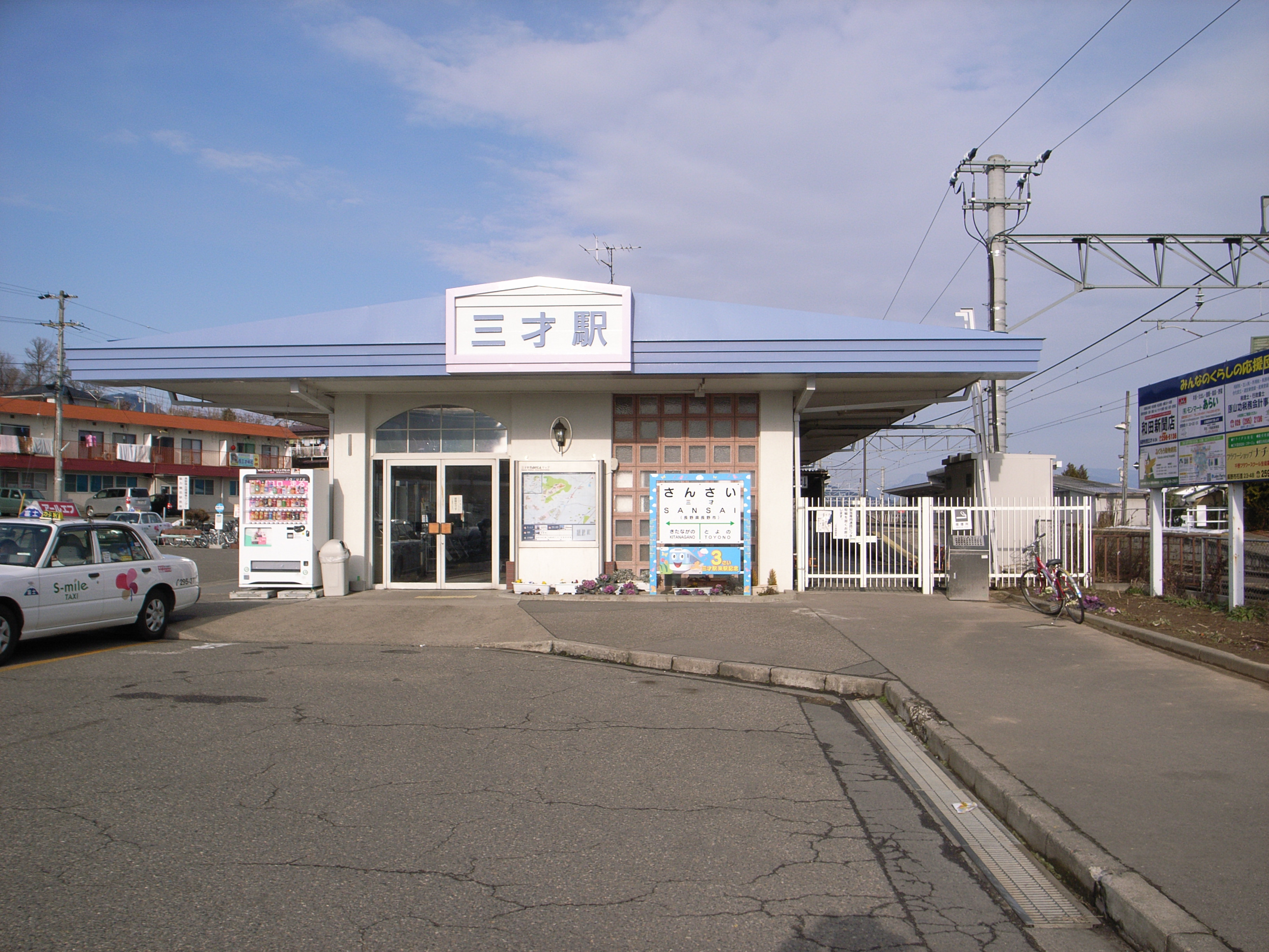 信越本線三才駅駅舎（南面）